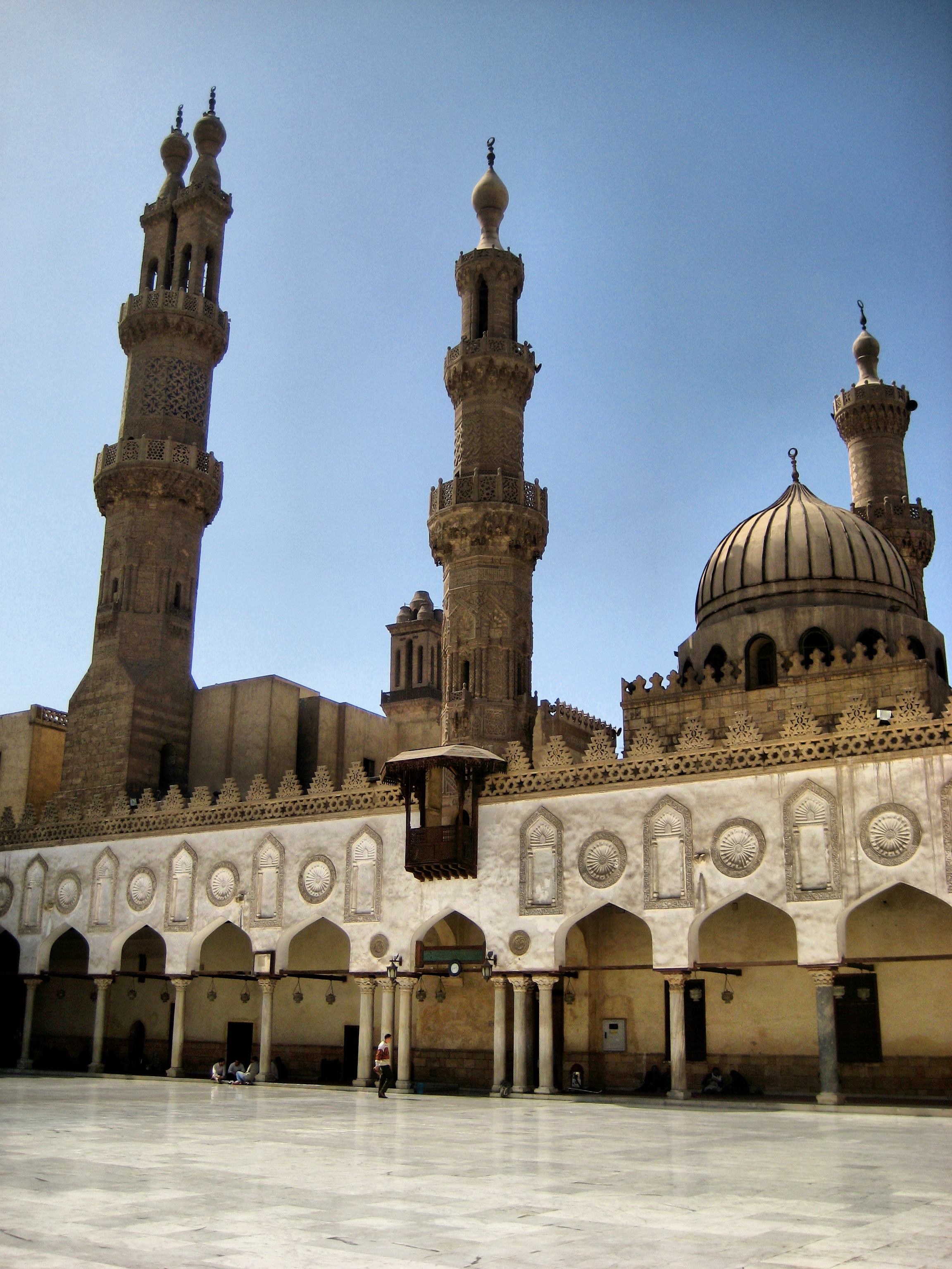 Al Azhar Mosque Interior